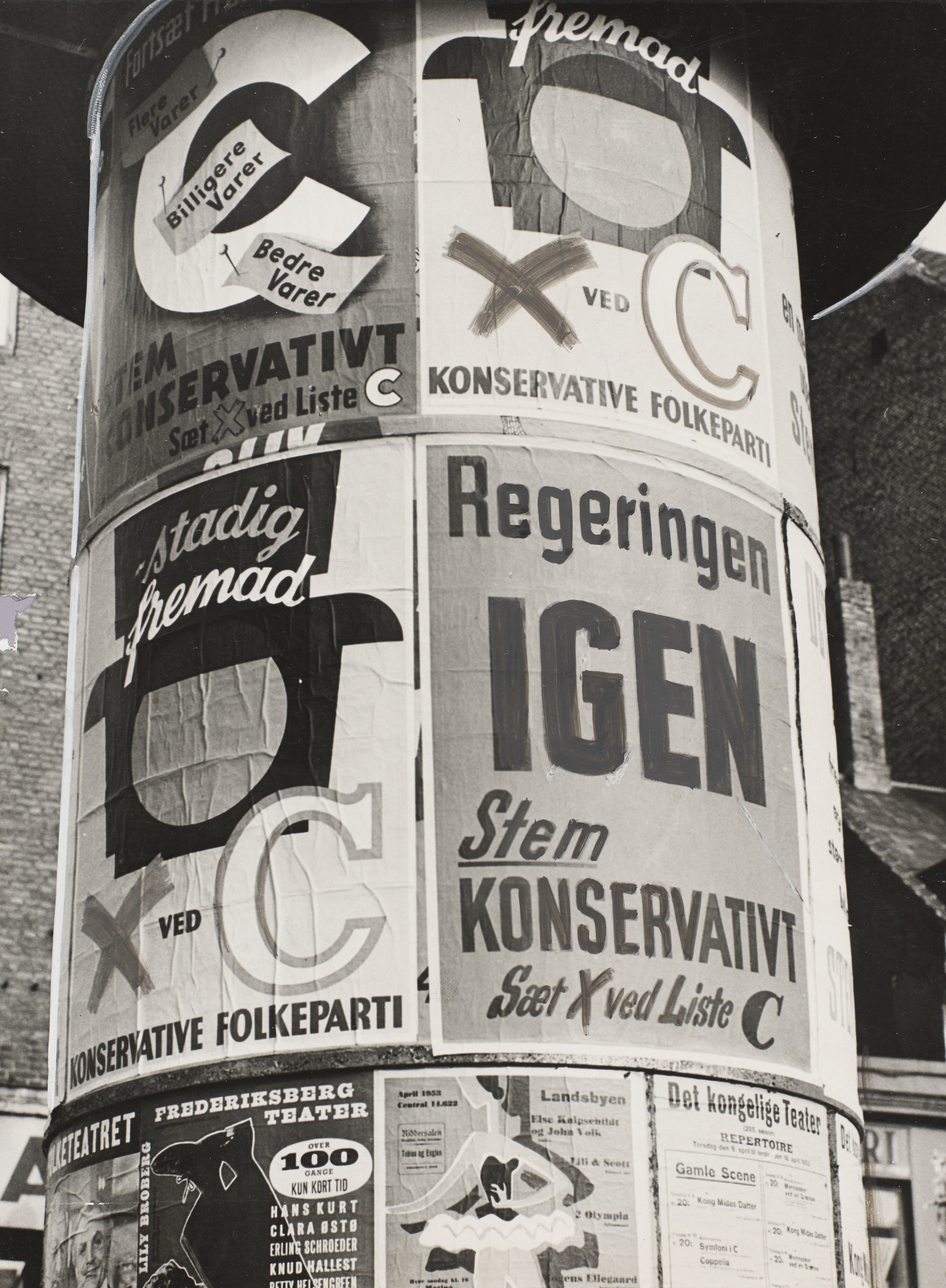 Plakater fra Det Konservative Folkeparti ved folketingsvalget i 1953.